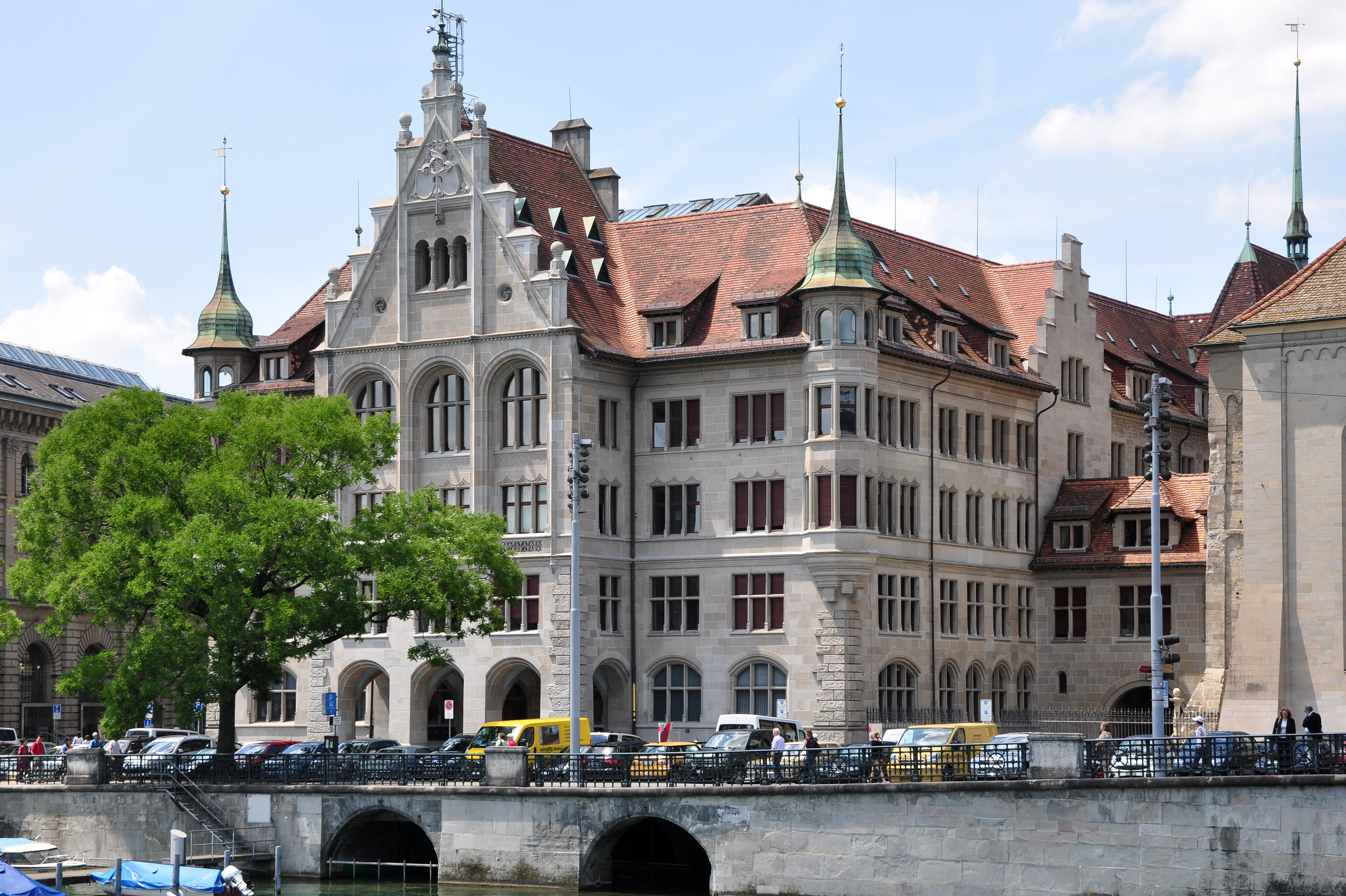 Stadthaus in Zürich (Switzerland) as seen from Münsterbrücke